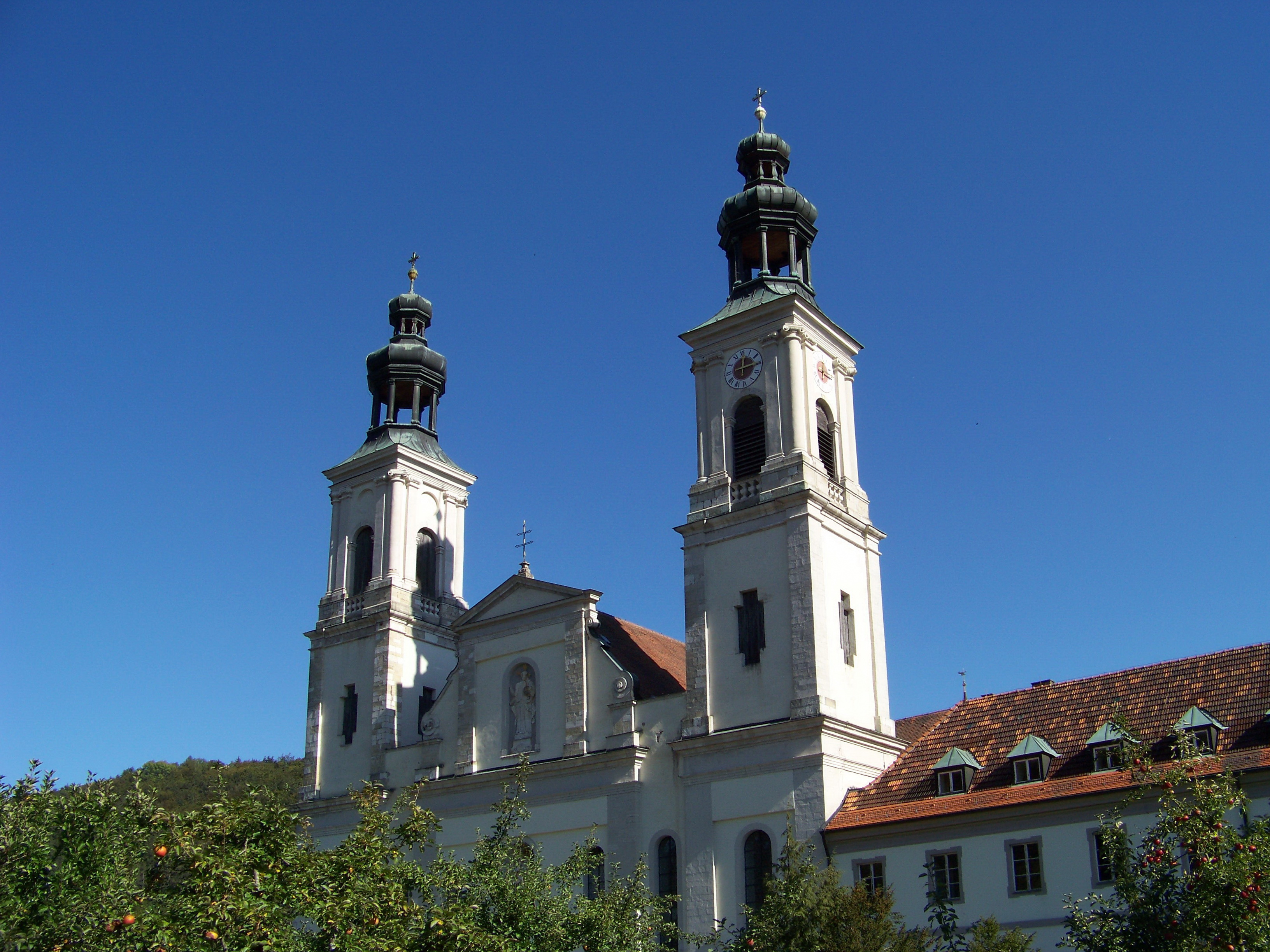 Pielenhofen. Katholische Pfarrkirche und ehem. Klosterkirche Mariä Himmelfahrt, Wandpfeilerkirche mit Satteldächern und Doppelturmfassade mit Giebelfront und Werksteingliederungen, bez. 1719, von Franz Beer.